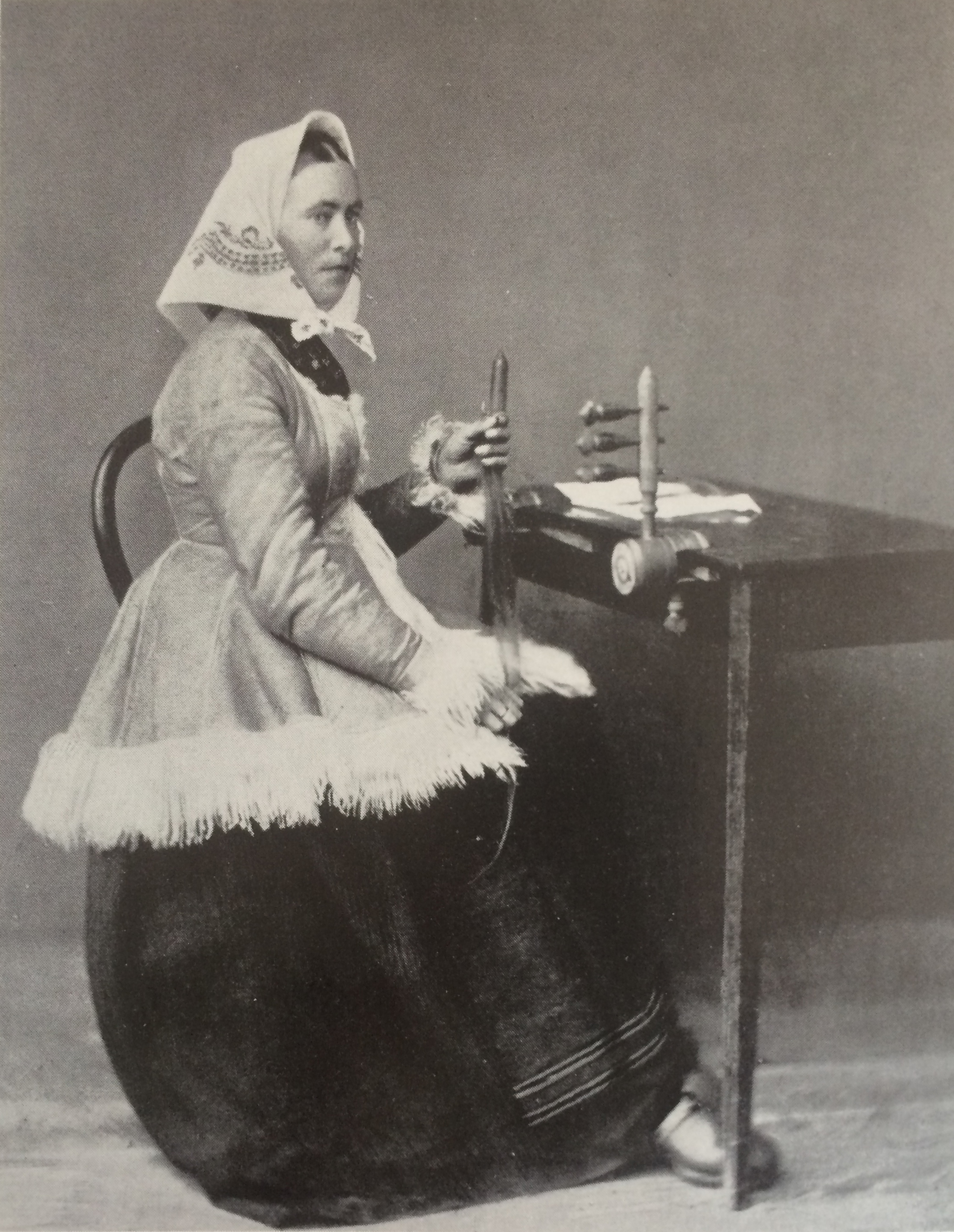 Hårkulla (hårarbeidsjente) fra Våmhus i Dalarna, Sverige. Hun er iført tradisjonell drakt fra området, og sitter ved et tresse-/kjedestativ, klar til å tvinne hår til et tynt kjede, som utgangspunkt for urkjede eller et smykke